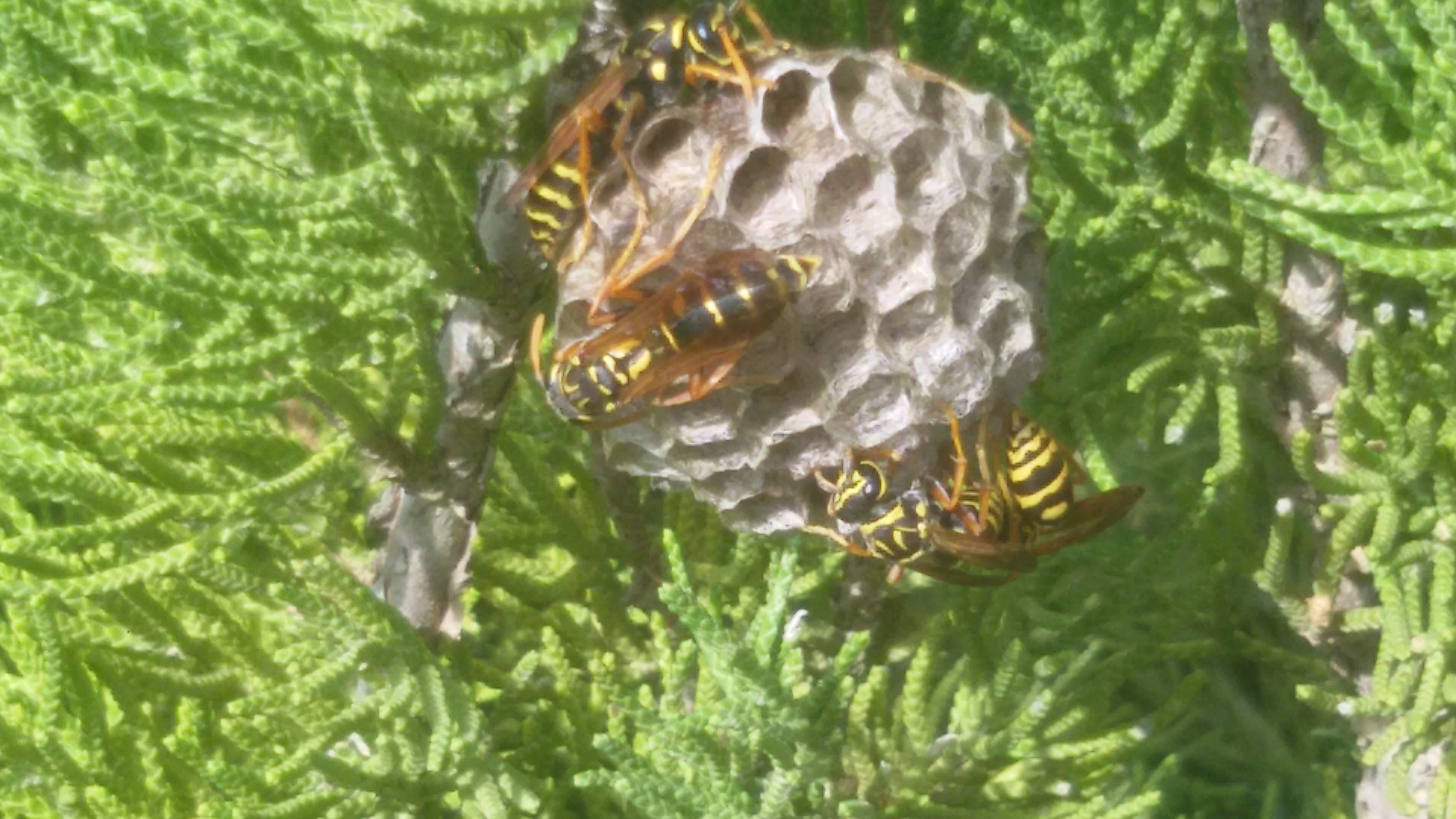 Осиное гнездо на кусте